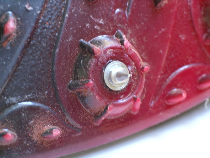 Track spike photo